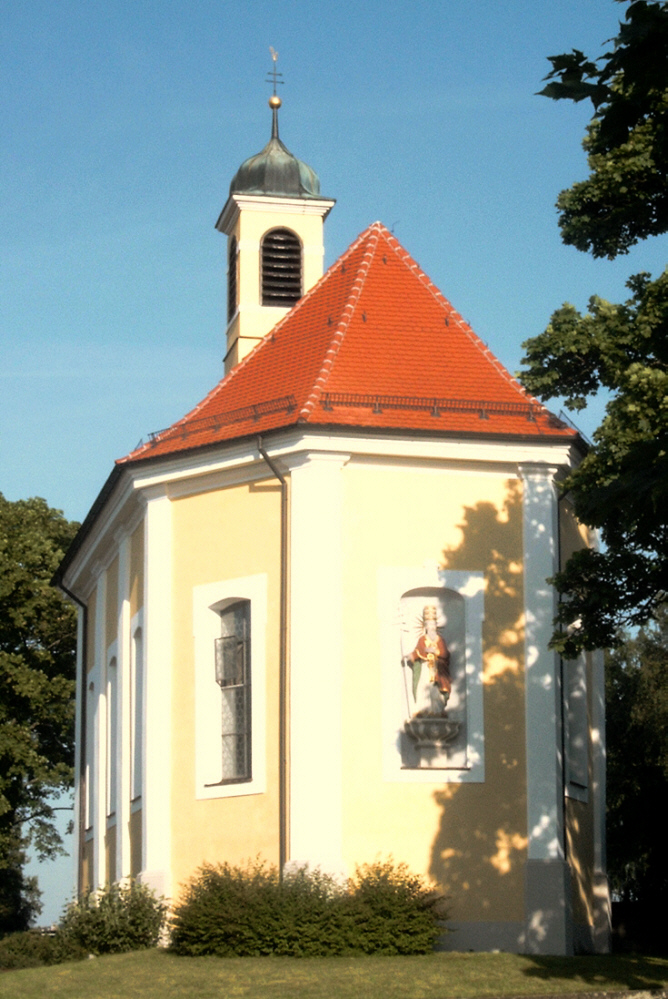 Silvesterkapelle in Westhausen